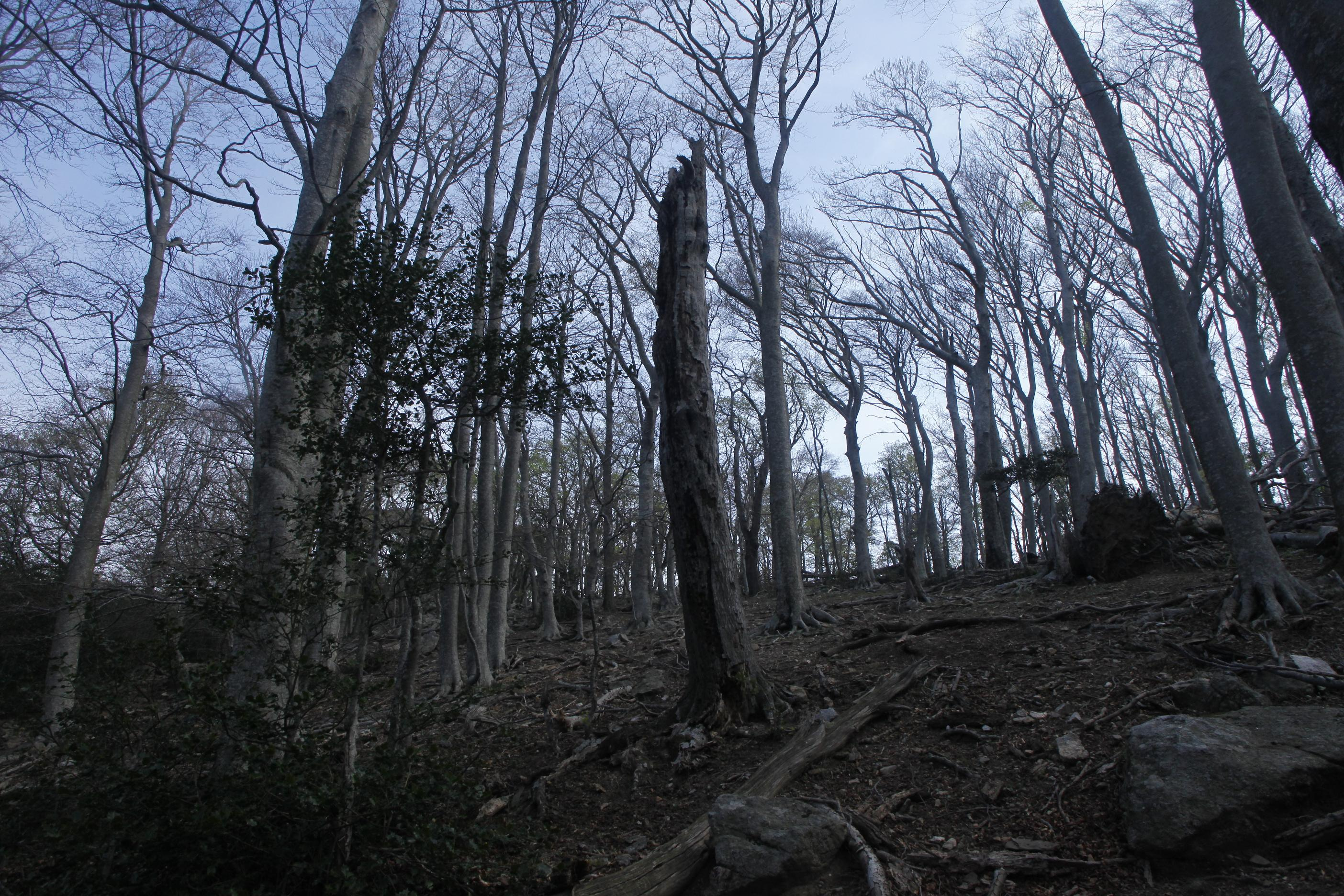 Hêtraie dans la forêt de la Massane